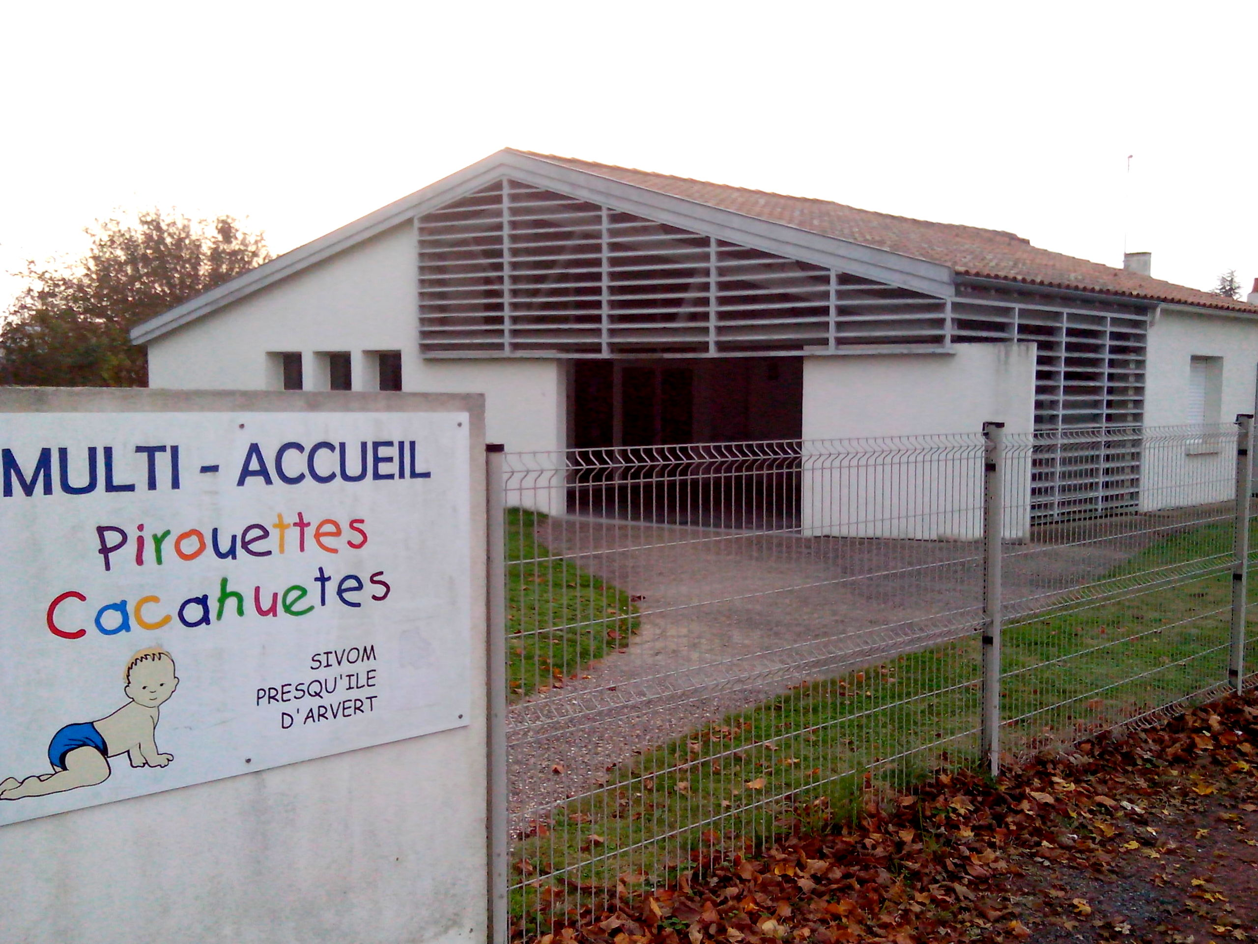 La crèche Pirouette Cacahuète à Arvert